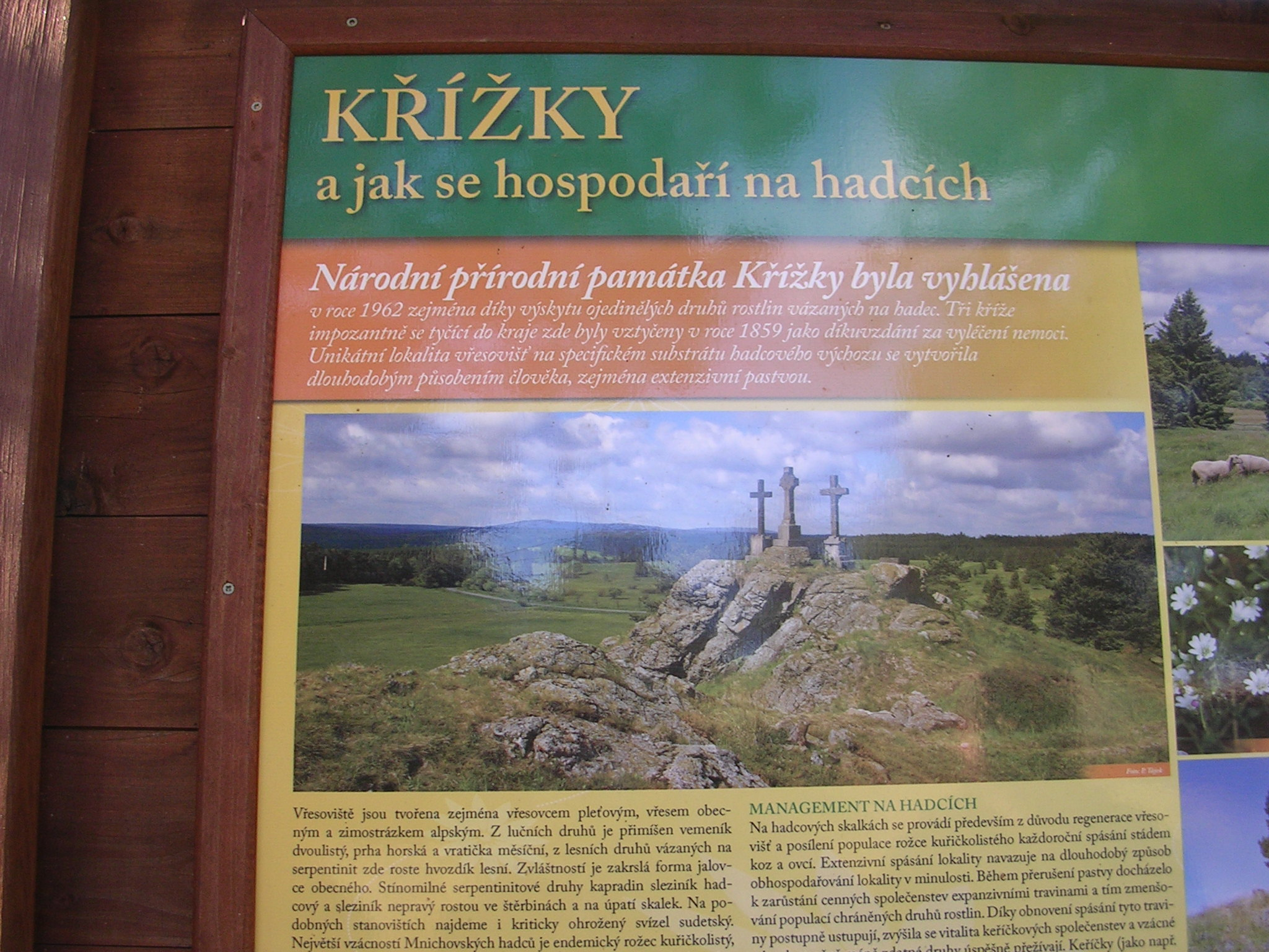 Informační tabule